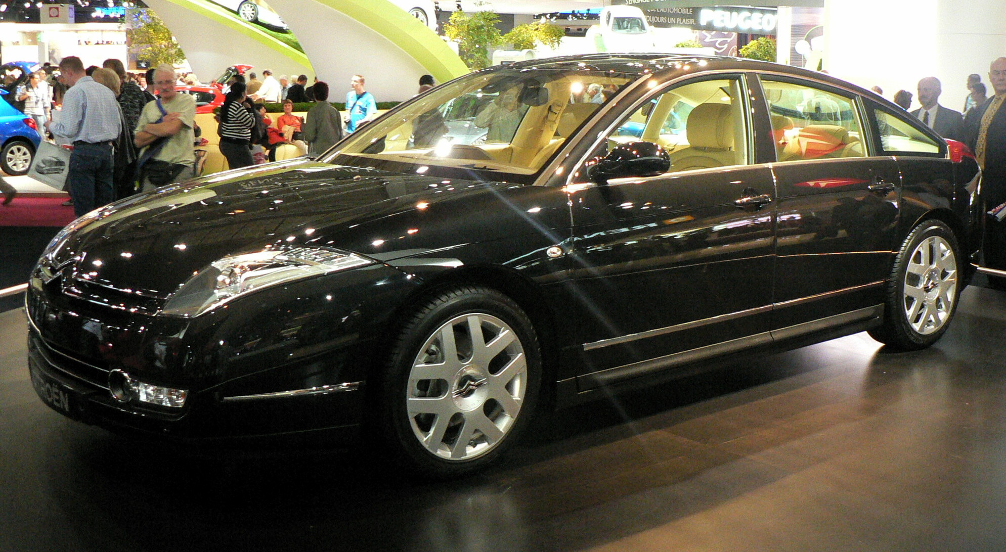 Mondial de l'automobile, Paris 2006